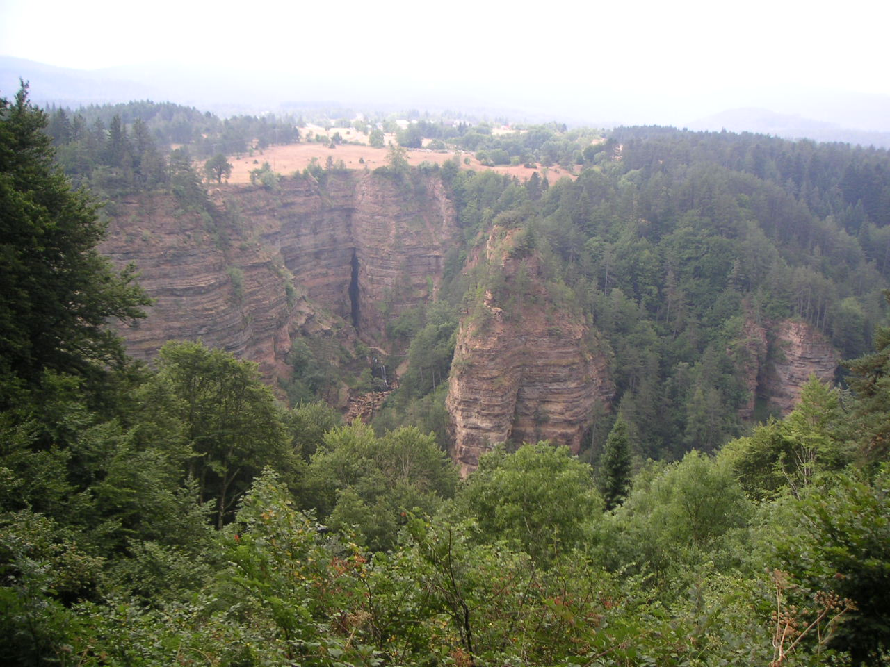 L'Abîme de Bramabiau vue du panorama Photo personnelle - TouN - libre de droit Prise le : 11 août 2005